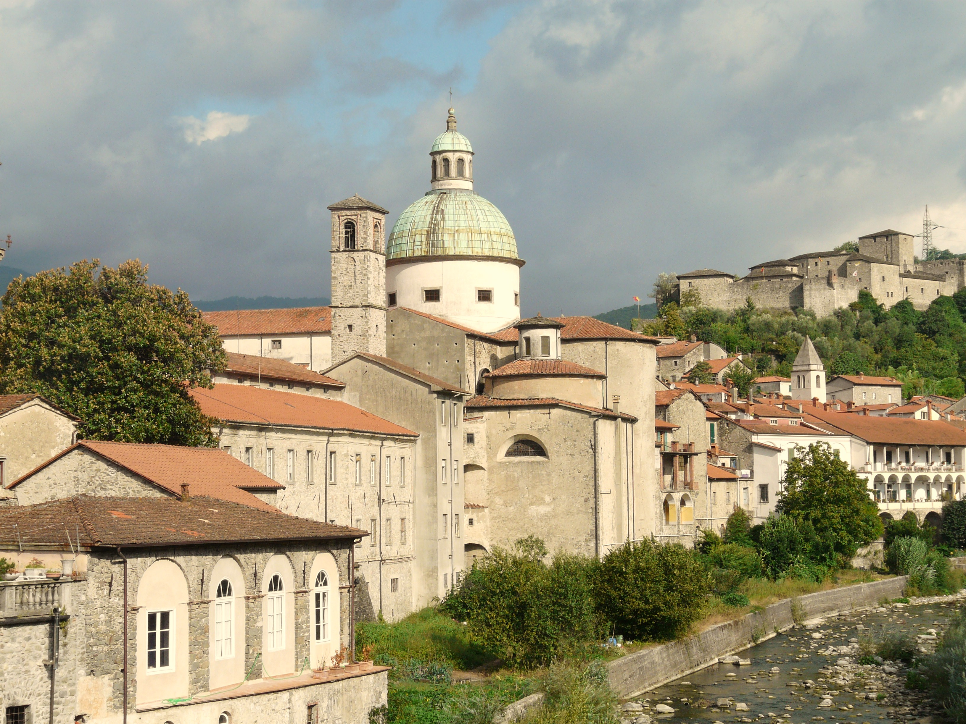 Pontremoli, Toscana, Italia